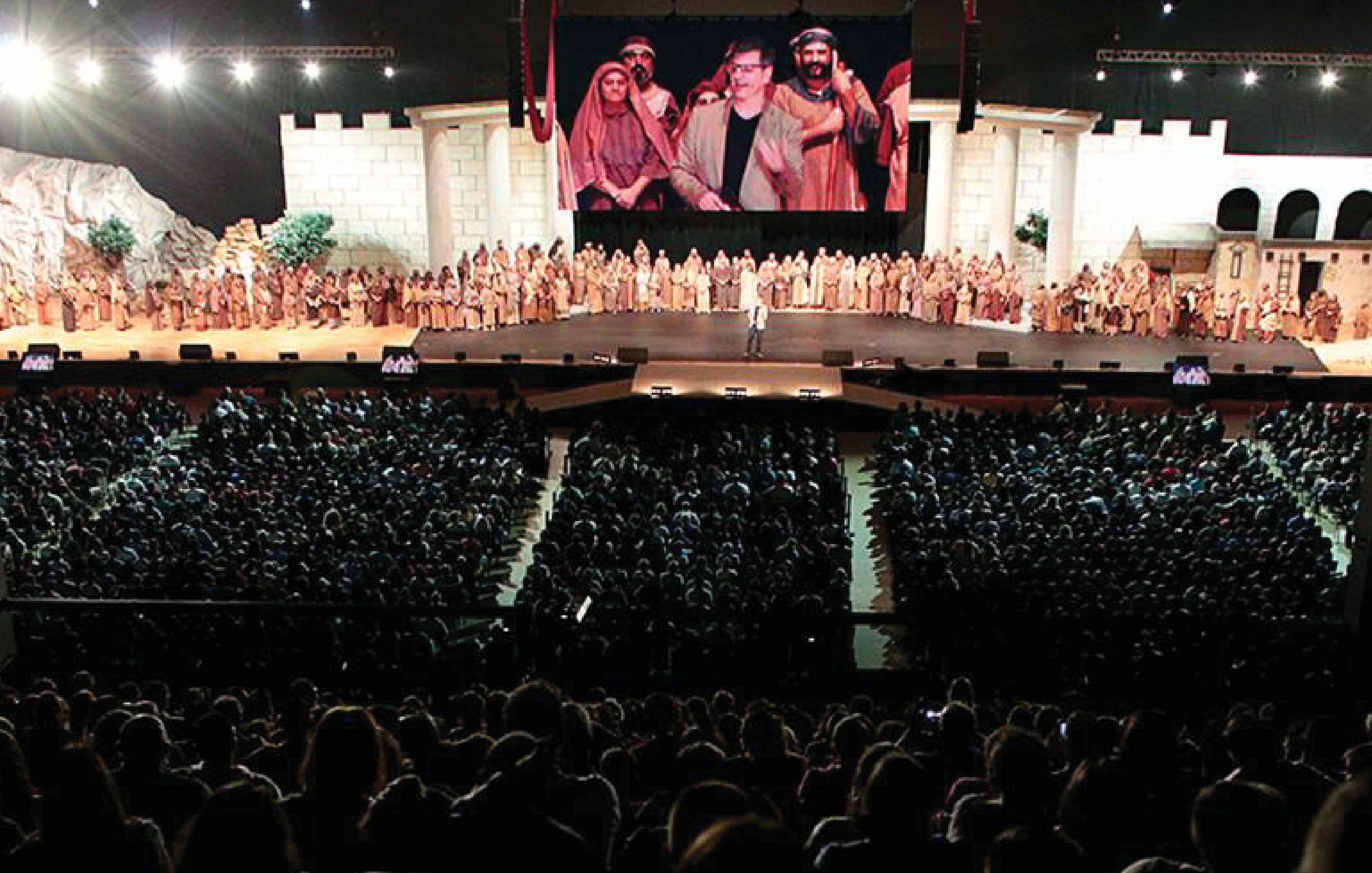 Auto de Páscoa - Igreja da Cidade